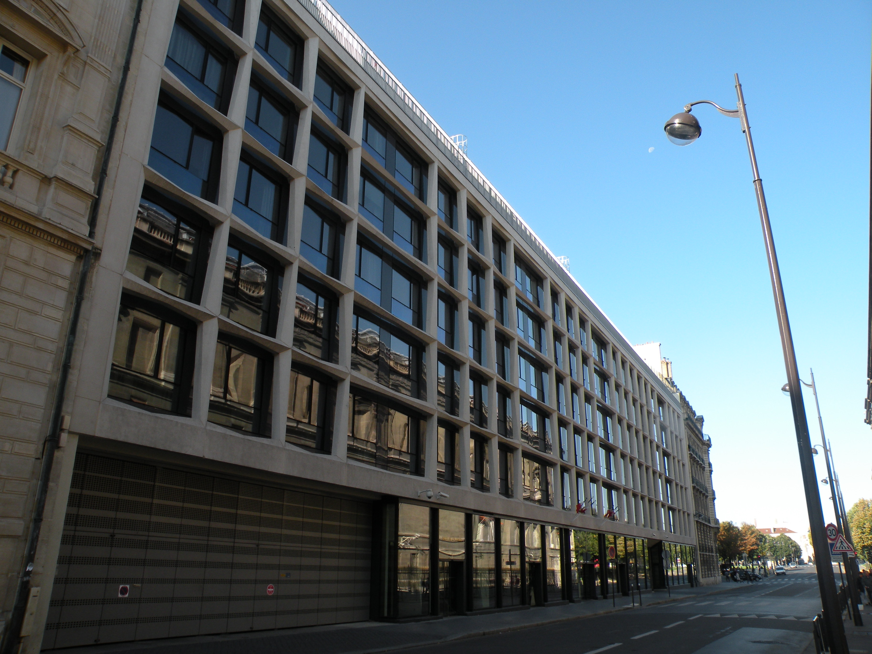 Assemblée Nationale, Immeuble Chaban Delmas